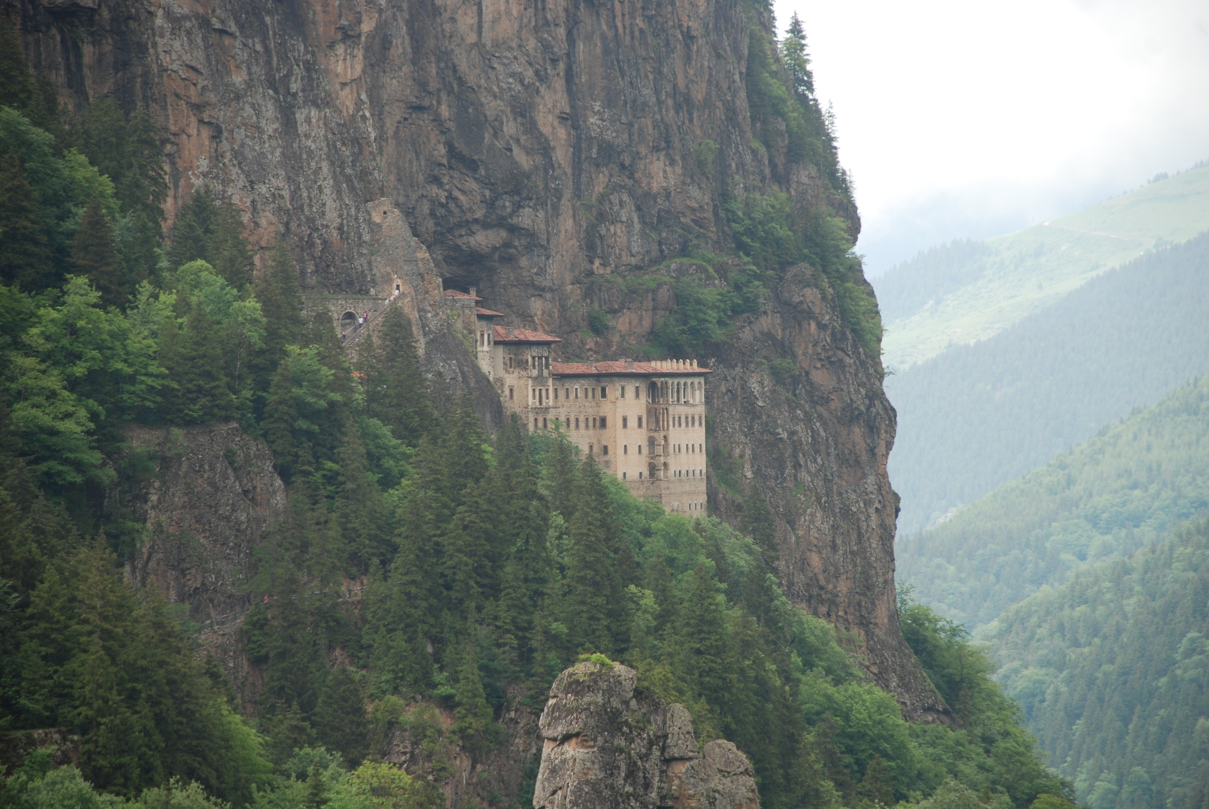 Sümela Manastırı.